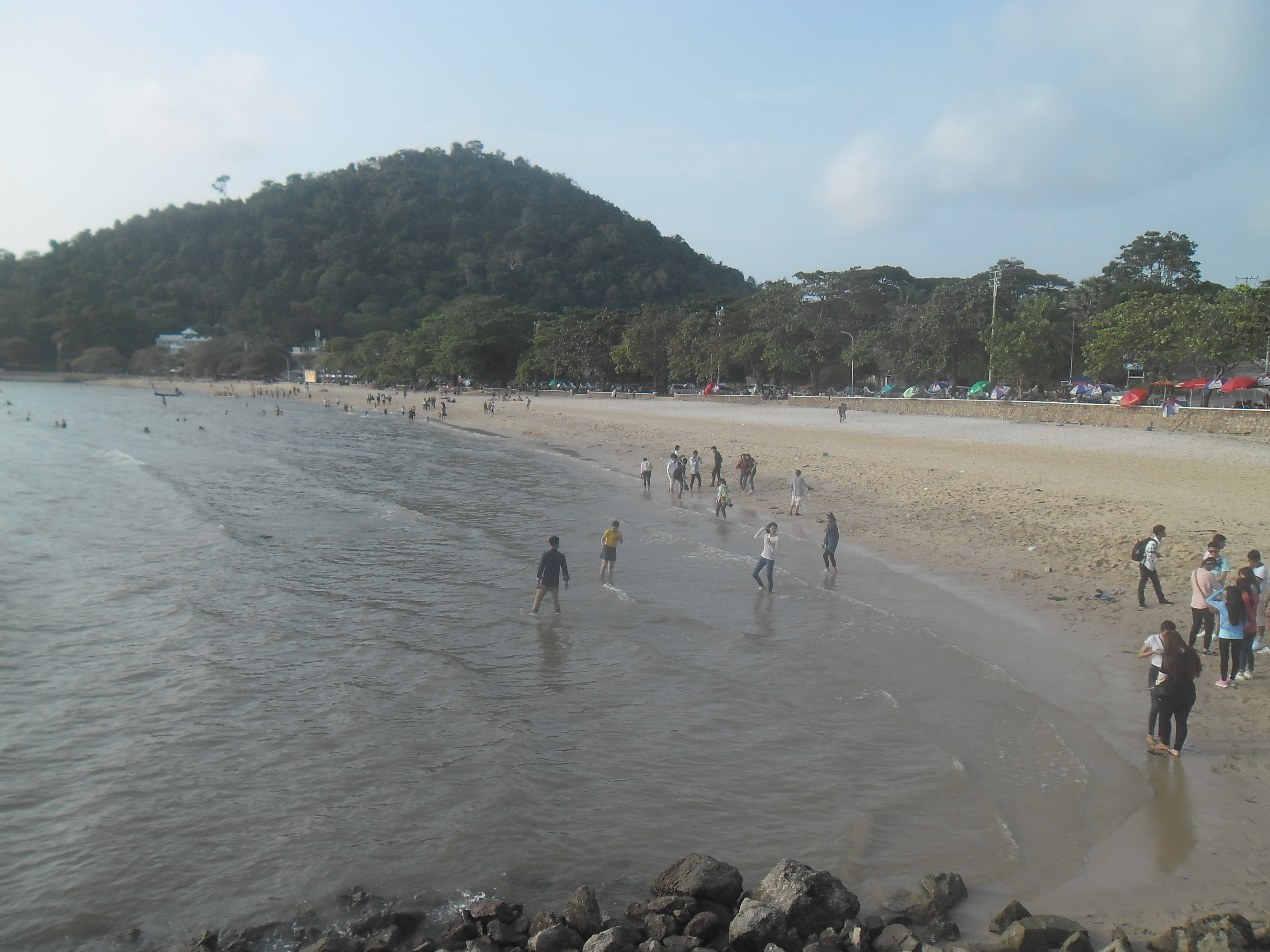 Kep, Kambodža